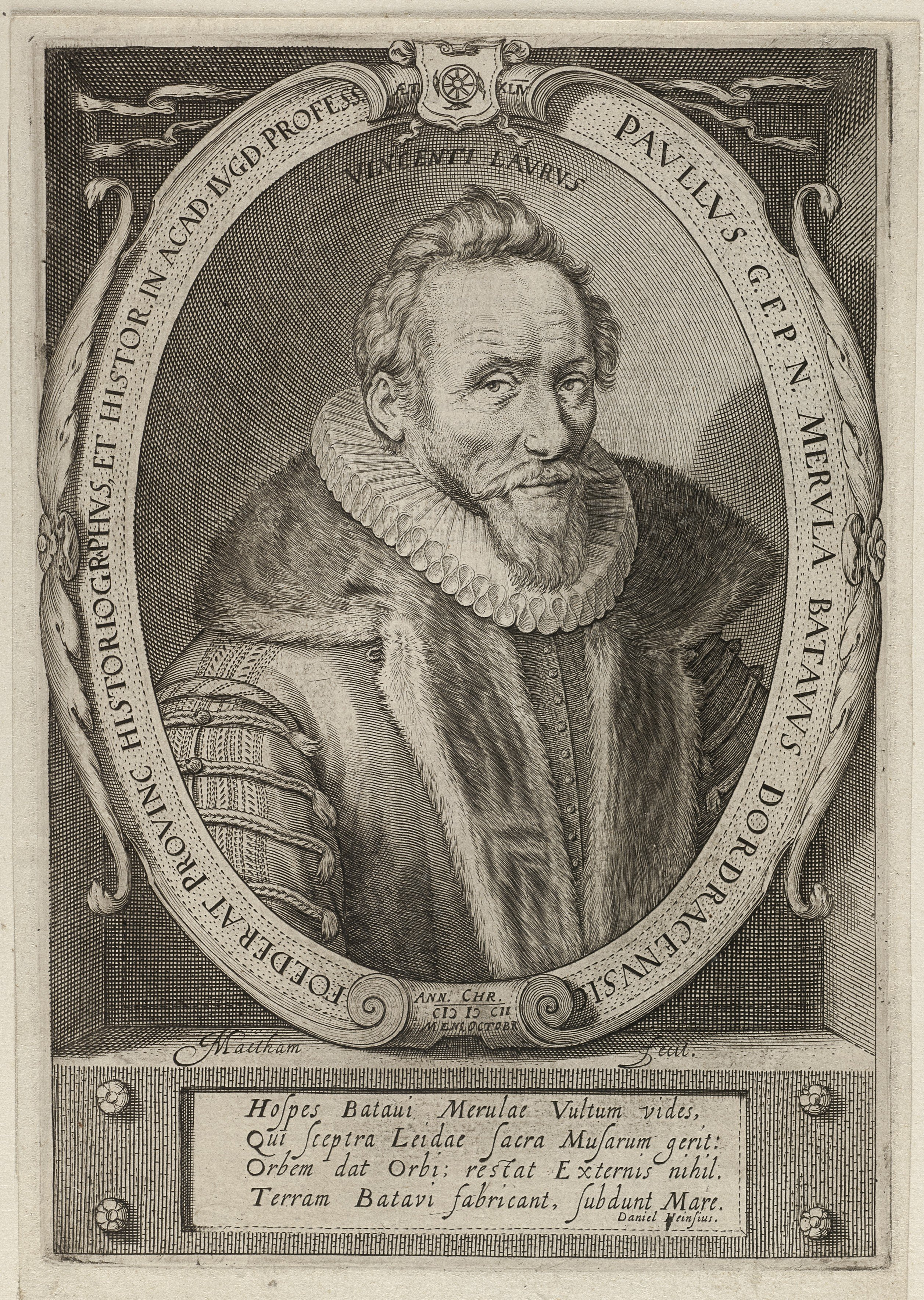 CollectieVoorhelm SchneevoogtInventarisnummerNL-HlmNHA_1477_53010834BeschrijvingPortret van de geleerde Paulus Merula (1558-1607) op 44-jarige leeftijd.Buste naar rechts, in ovaal met naam en tekst in randschrift. De geleerde is gekleed in een mantel afgezet met brede bontkraag, waarboven de molensteenkraag is te zien. Hij draagt een snor en een puntbaardje.Gravure door Jacob Matham met Latijns onderschrift van Daniël Heinsius, gesigneerd en gedateerd.FotonummerNL-HlmNHA_1477_53010834DocumenttypePortrettenVervaardigerMatham, Jacob (1571-1631), Heinsius, Daniël (1580-1655) Begindatum1602Einddatum1602TechniekGrafiek Drukwerk LiteratuurNew Hollstein Dutch, Jacob Matham, 248-1(2)